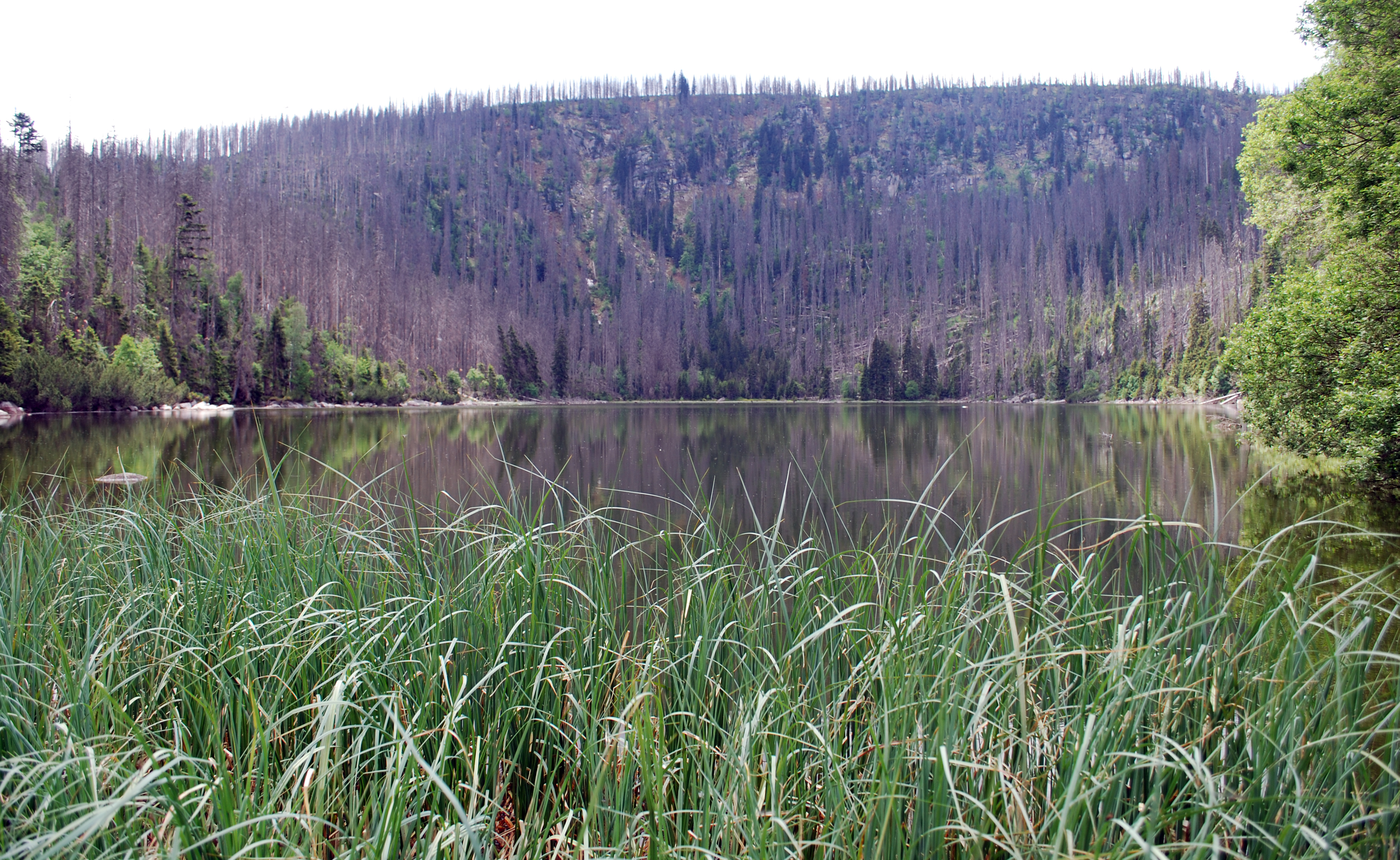 Plöckenstein vom Plöckensteinsee